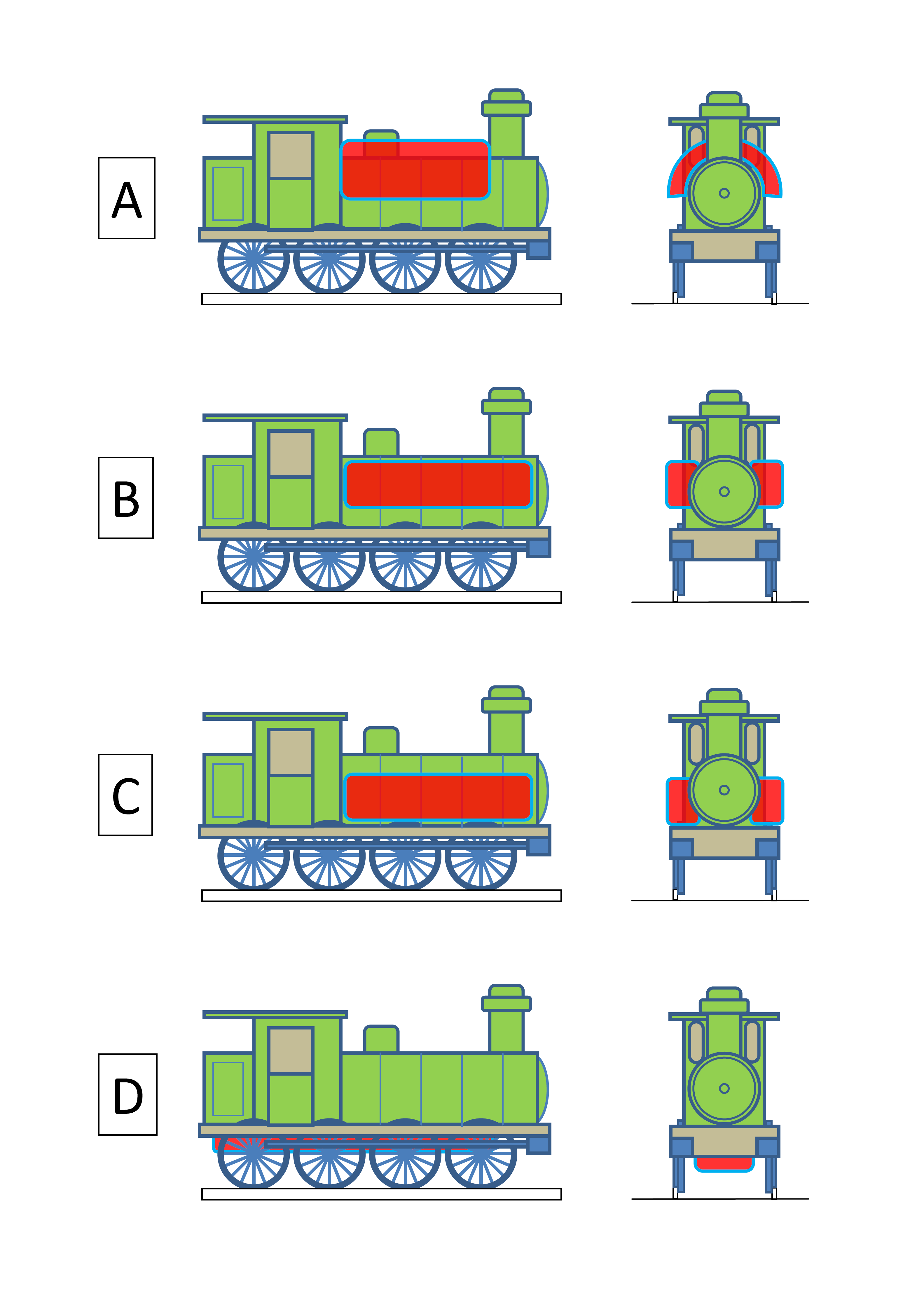 Posiciones de los depósitos de agua en una locomotora-ténder: A): "Silla de montar" B): "Alforjas" C):"Laterales" D):"De fondo"